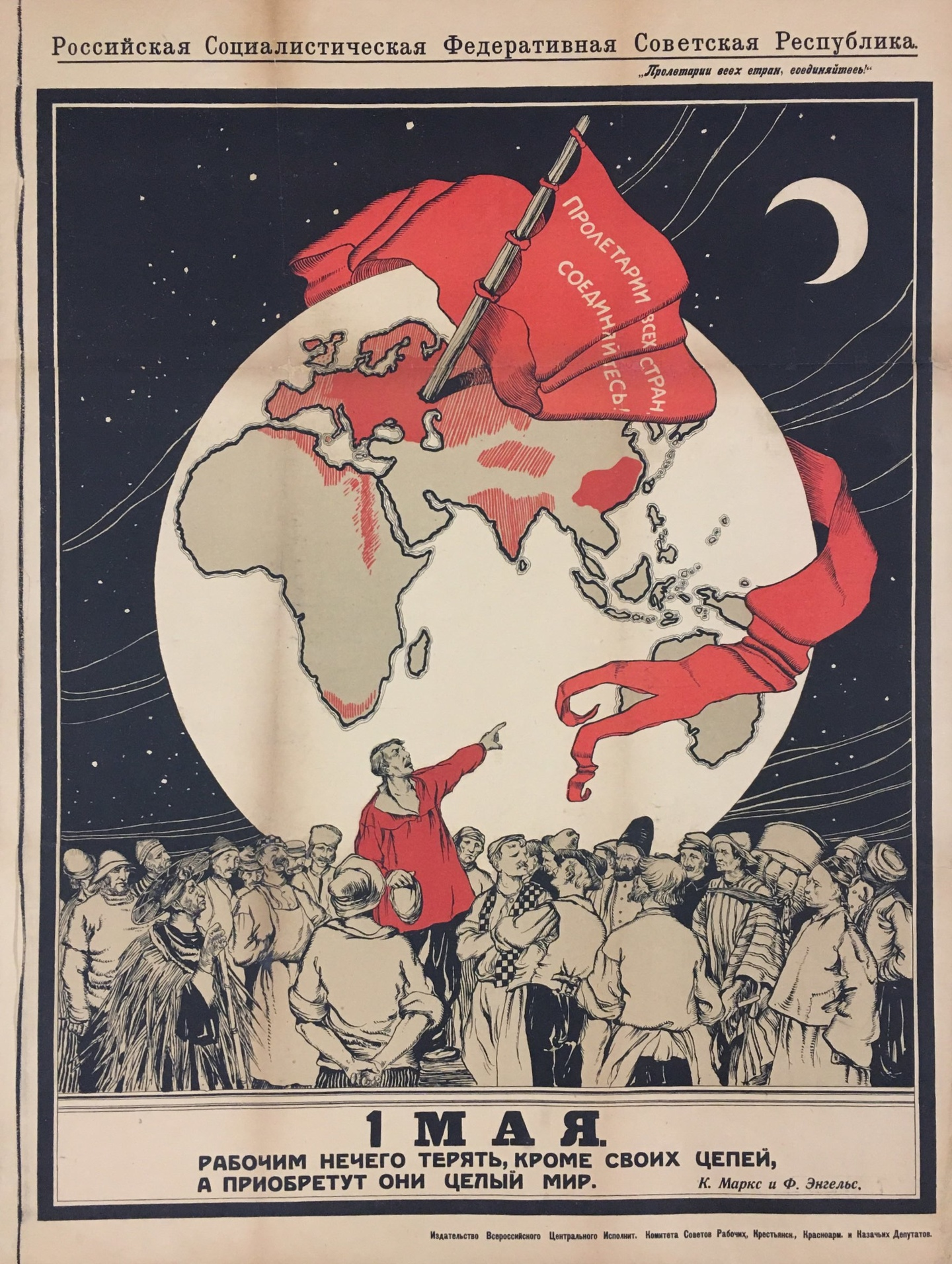 1 Мая/ Рабочим нечего терять, кроме своих цепей...